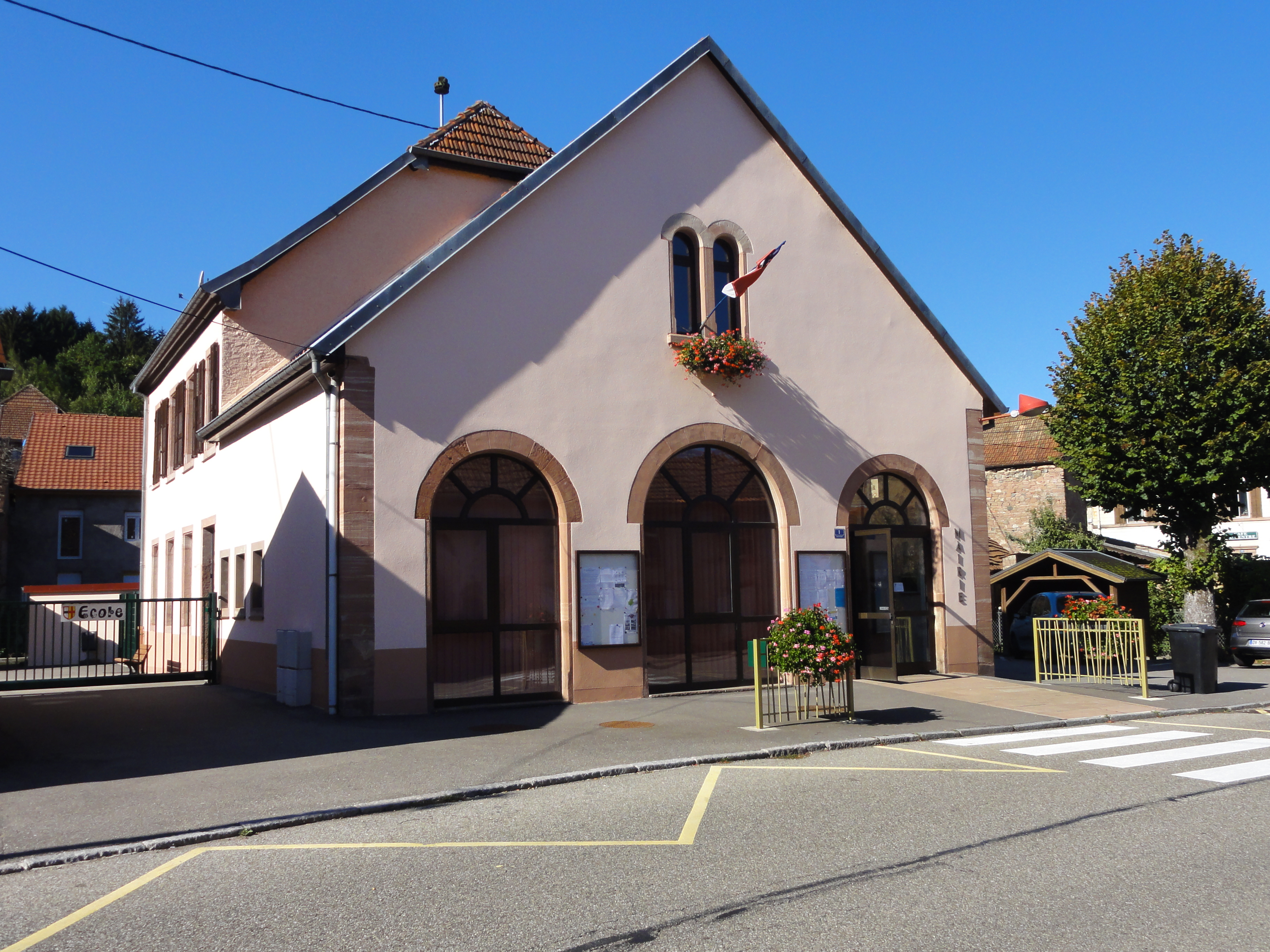 Alsace, Bas-Rhin, Saint-Blaise-la-Roche, Mairie.